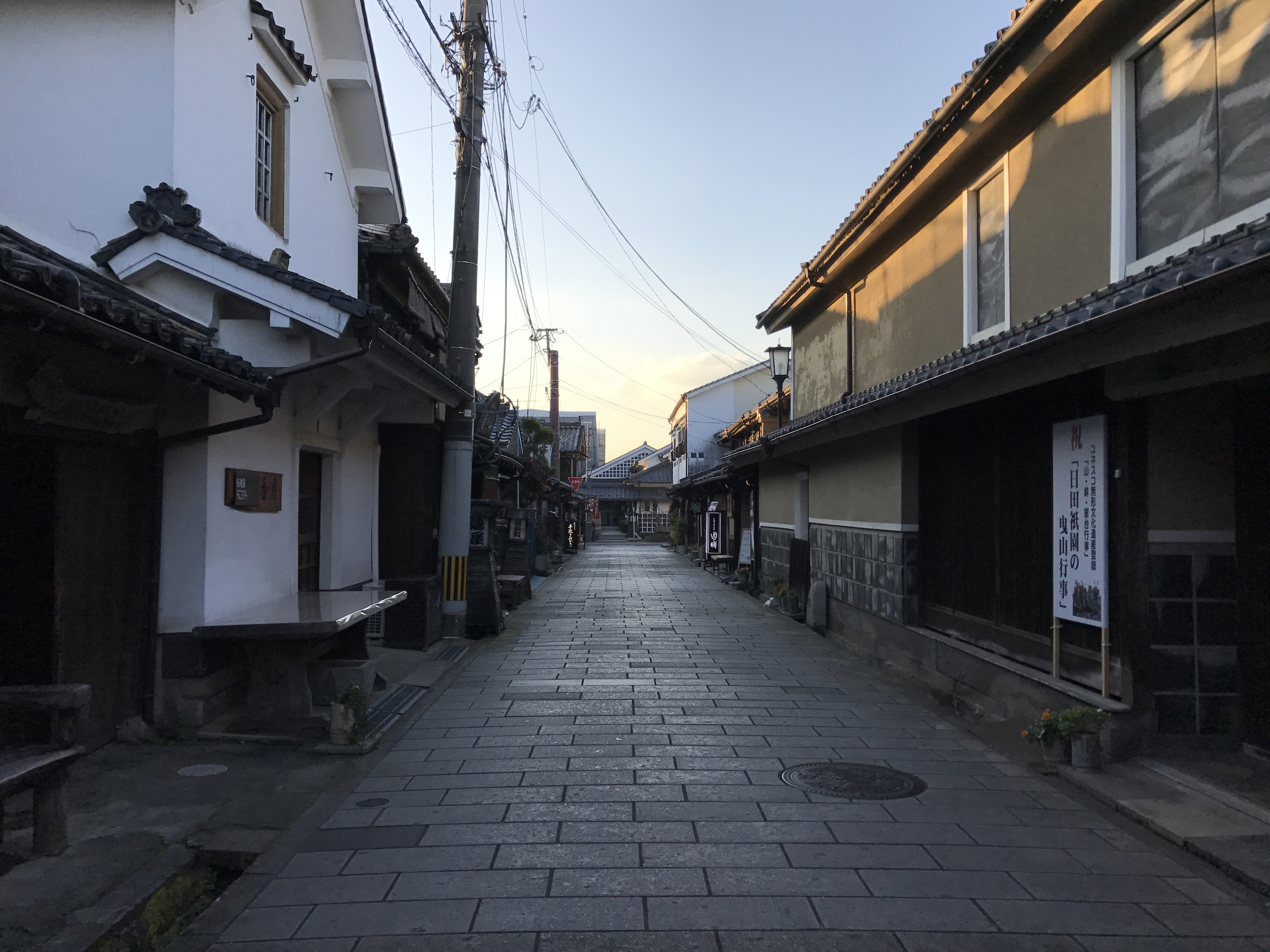 豆田町・廣瀬資料館前の魚町通り